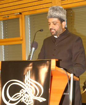 Dieses Bild ist von Khilafat Tag 2008. Imam Sadaqat Ahmed / 100 Jahre Khilafat